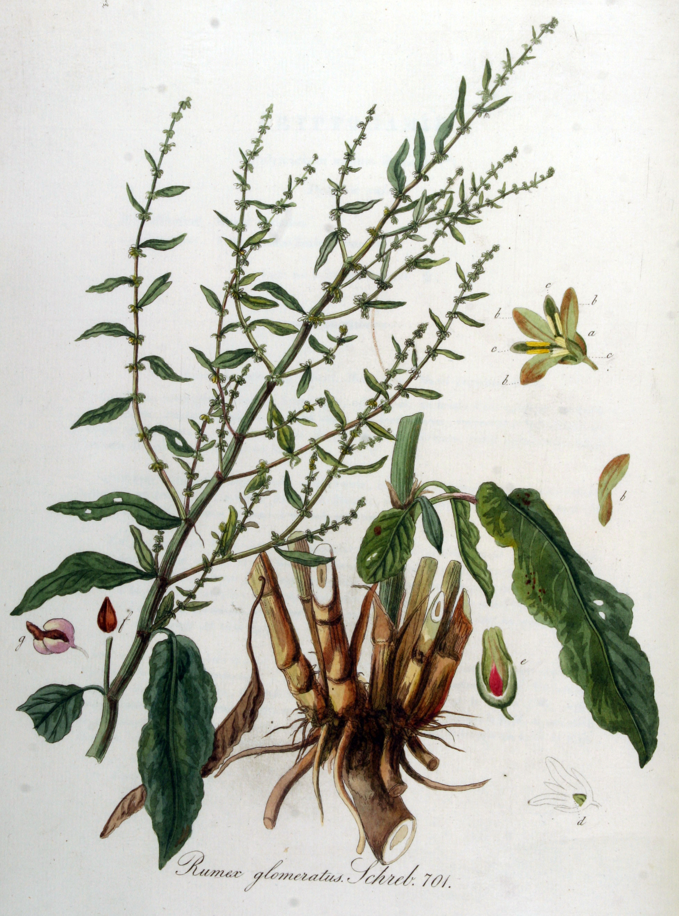 Rumex conglomeratus Murray (Syn. Rumex glomeratus Schreb.)